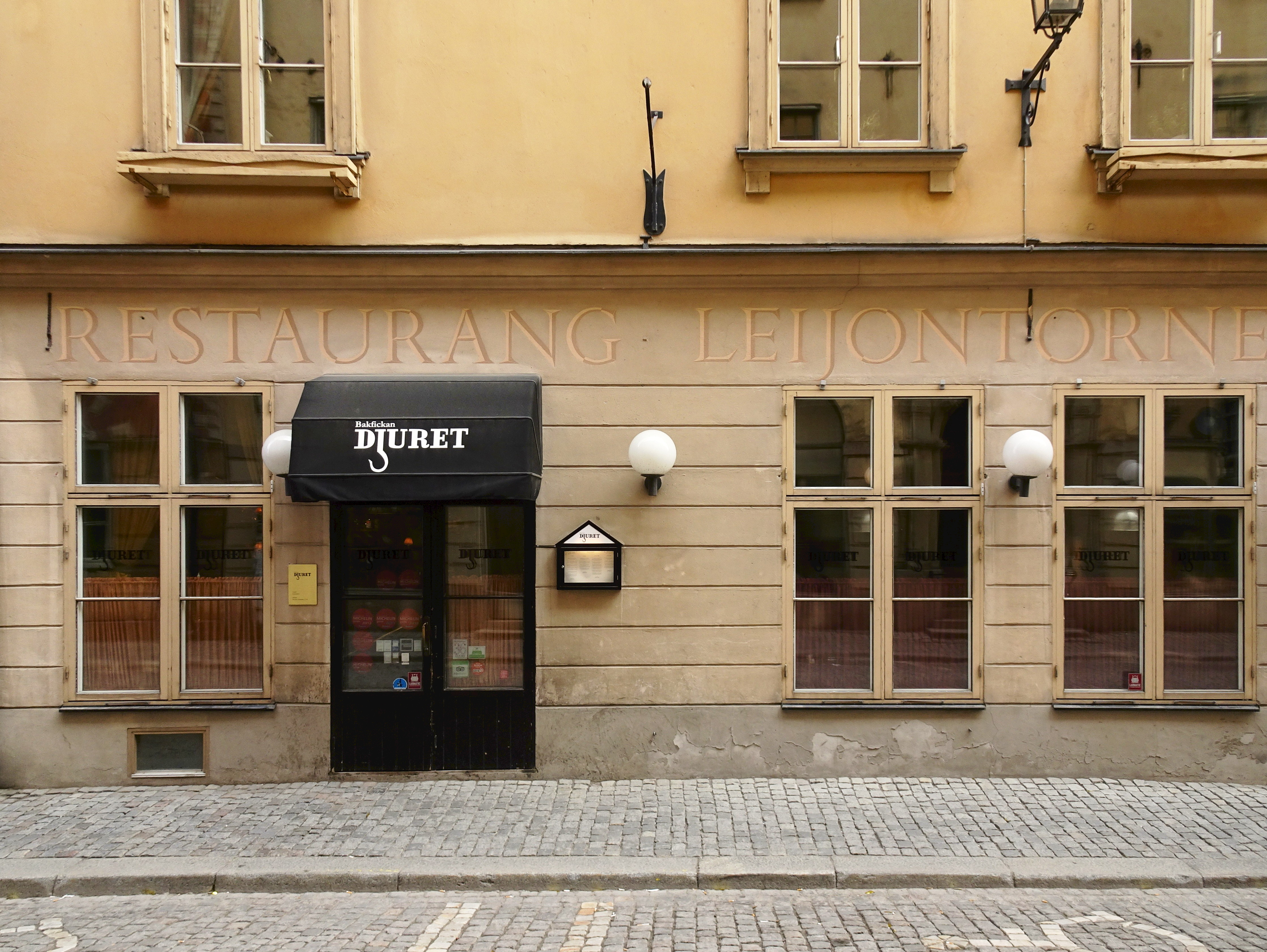 Kvarteret Tritonia, Lilla Nygatan 5